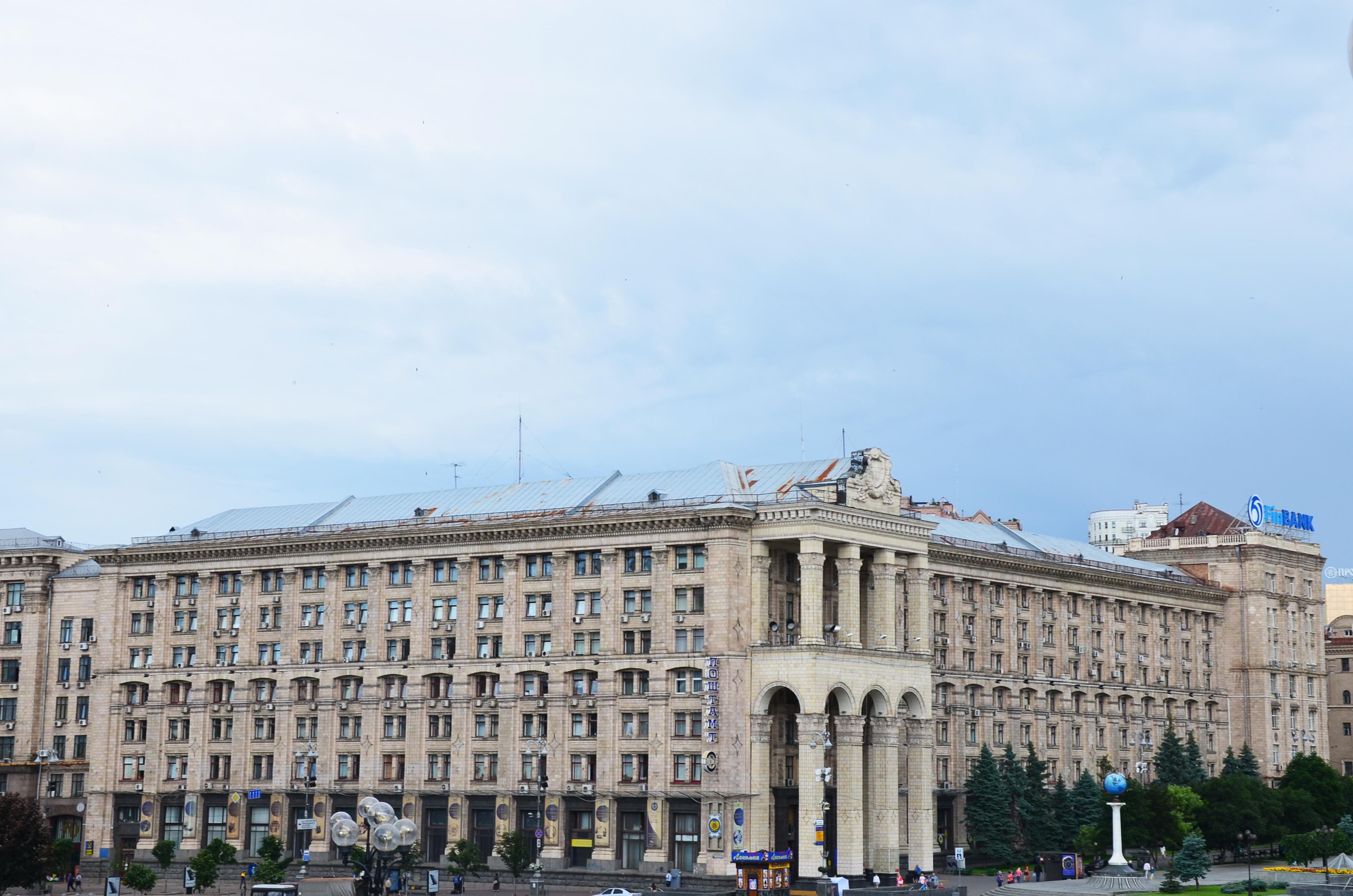 Пам'ятка архітектури. Будівля Поштампу на Хрещатику 20-22. Київ.